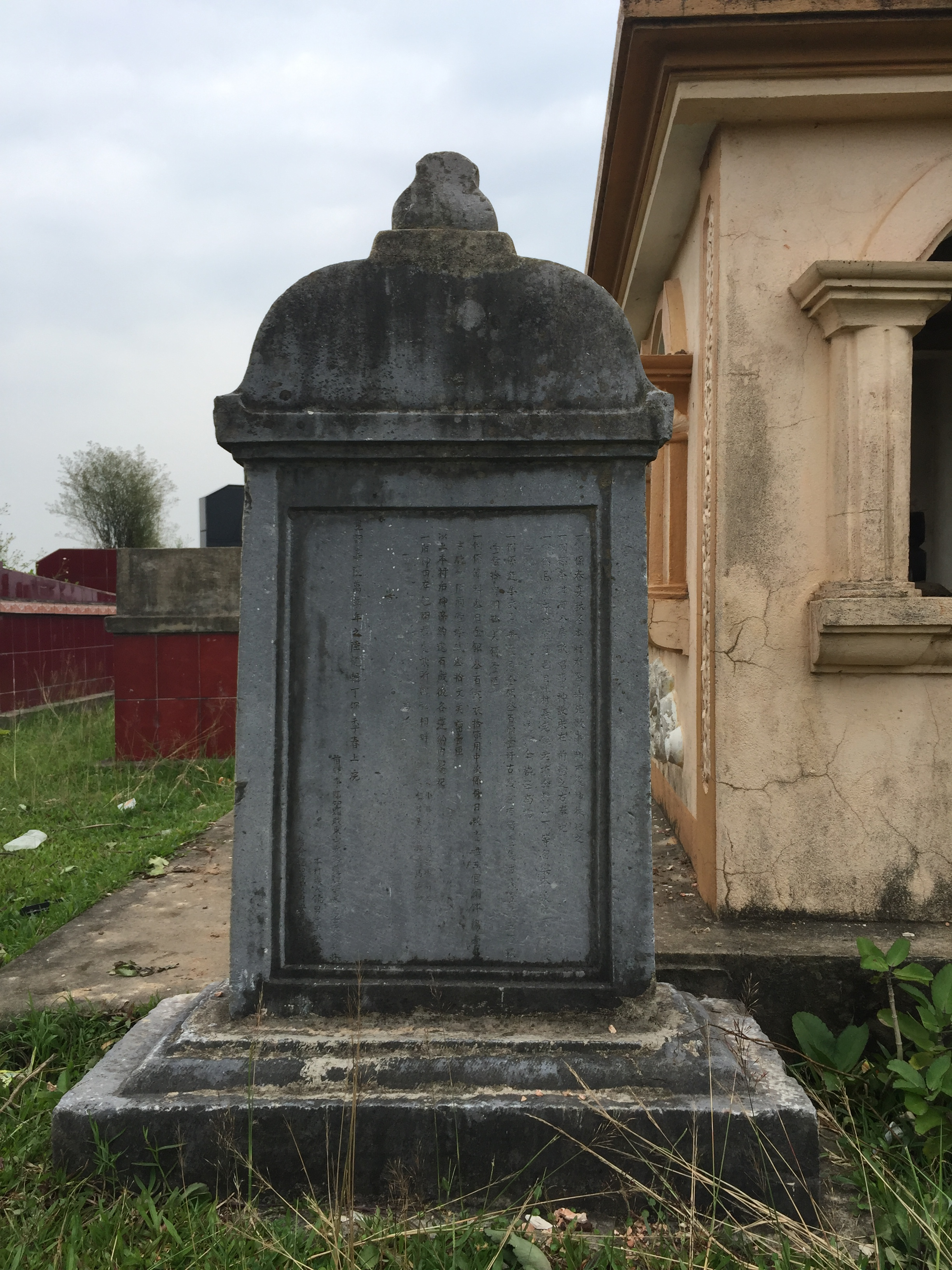 Hậu Thần Bi kí ghi lại lịch sử họ Nguyễn Đình và lịch sử làng Quần Trúc thời kì thế kỉ 18